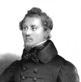 Artur Zawisza Czarny herbu Sulima